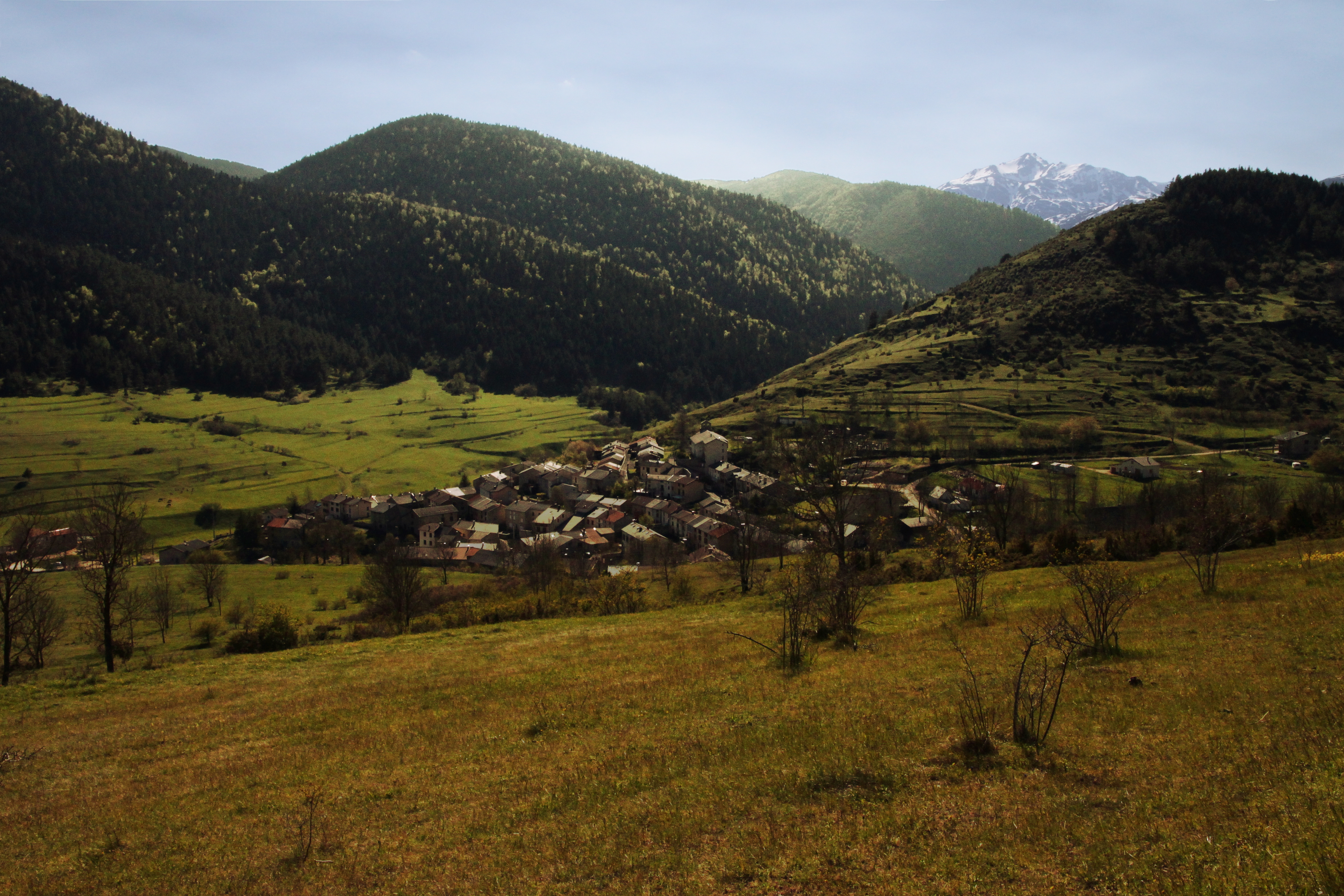 Village de Comus situé au Pays de Sault dans l'Aude